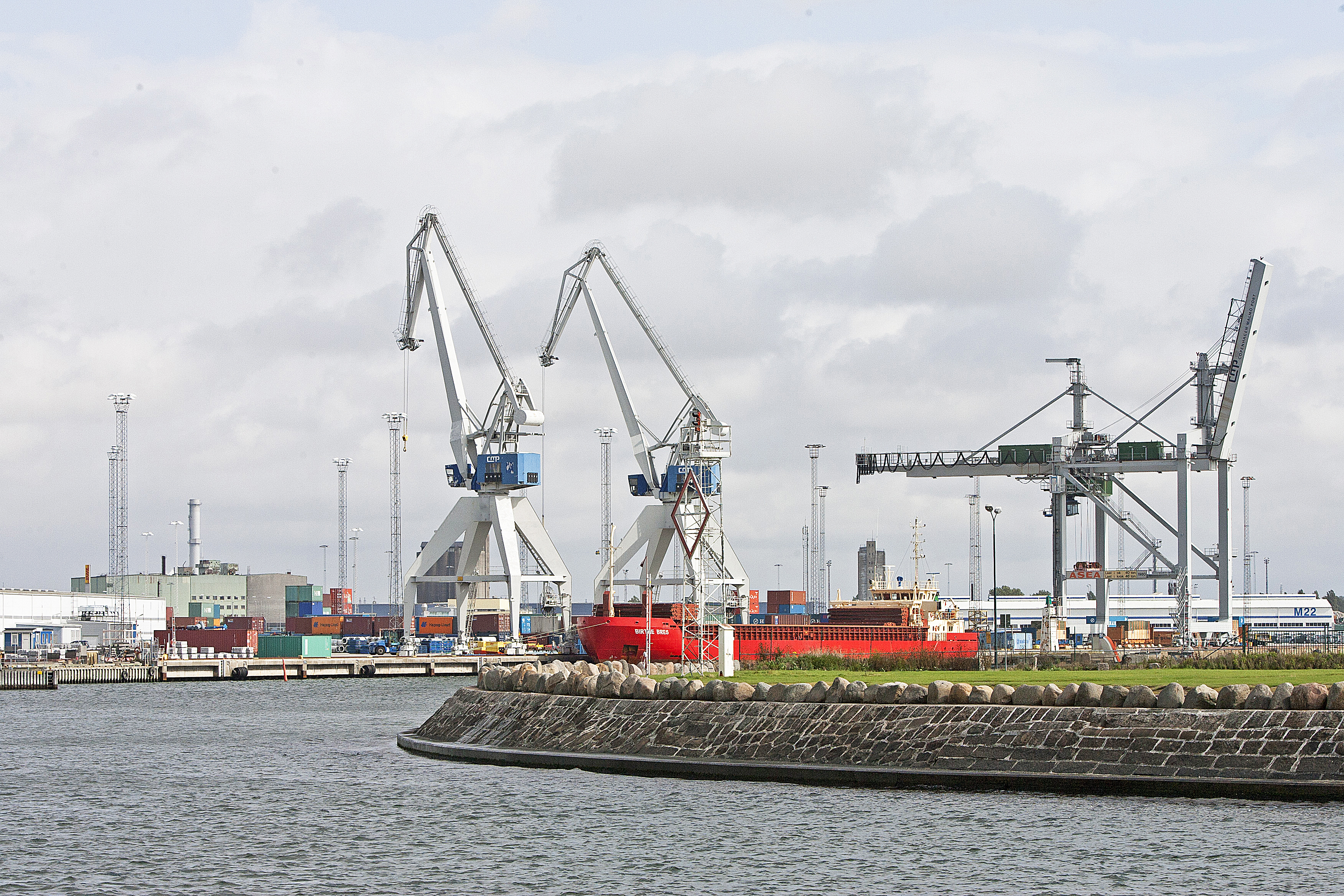 Malmö hamn fotograferad 20110907. Hamnområdet ägs av Malmö stad medan hamndriften drivs av Köpenhamns och Malmös gemensamma hamnbolag Copenhagen Malmö Port, CMP. CMP ägs till hälften av danska By & Havn (ägt gemensamt av Københavns Kommune och danska staten), Malmö stad samt en grupp privata svenska företag. Foto: News Øresund – Johan Wessman. © News Øresund. Bilden får fritt publiceras under förutsättning att källa anges. The picture can be used freely under the prerequisite that the source is given. Politics Originalfil tillhandahålles gratis, kontakta: News Øresund, Malmö, Sweden. News Øresund är en oberoende regional nyhetsbyrå som ingår i projektet Øresund Media Platform som drivs av Øresundsinstituttet i partnerskap med Lunds universitet och Roskilde Universitet och med delfinansiering från EU (Interreg IV A Öresund) och 14 regionala, icke kommersiella aktörer.